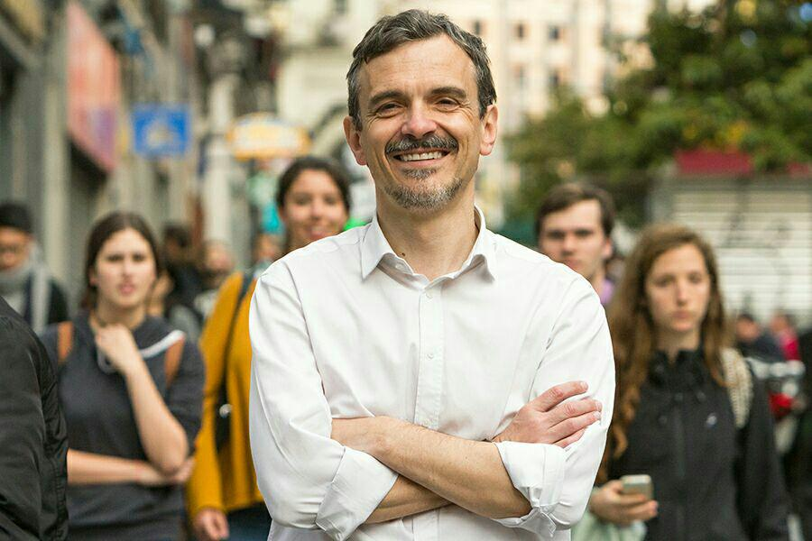 José Manuel López en 2015